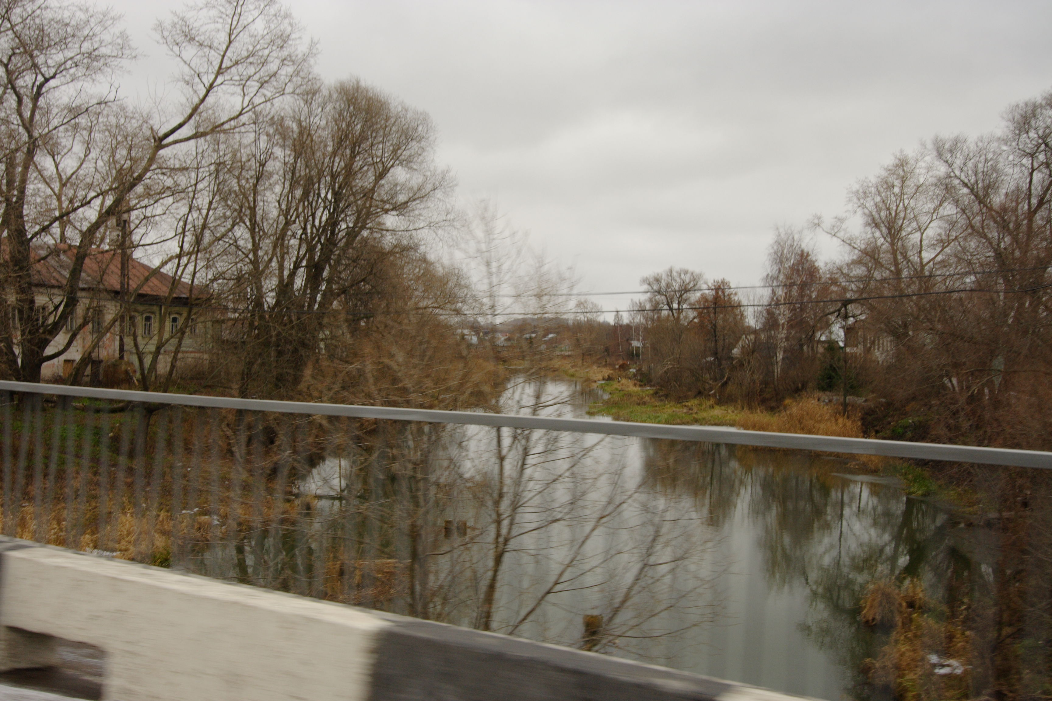 Река Сара в Поречье-Рыбном